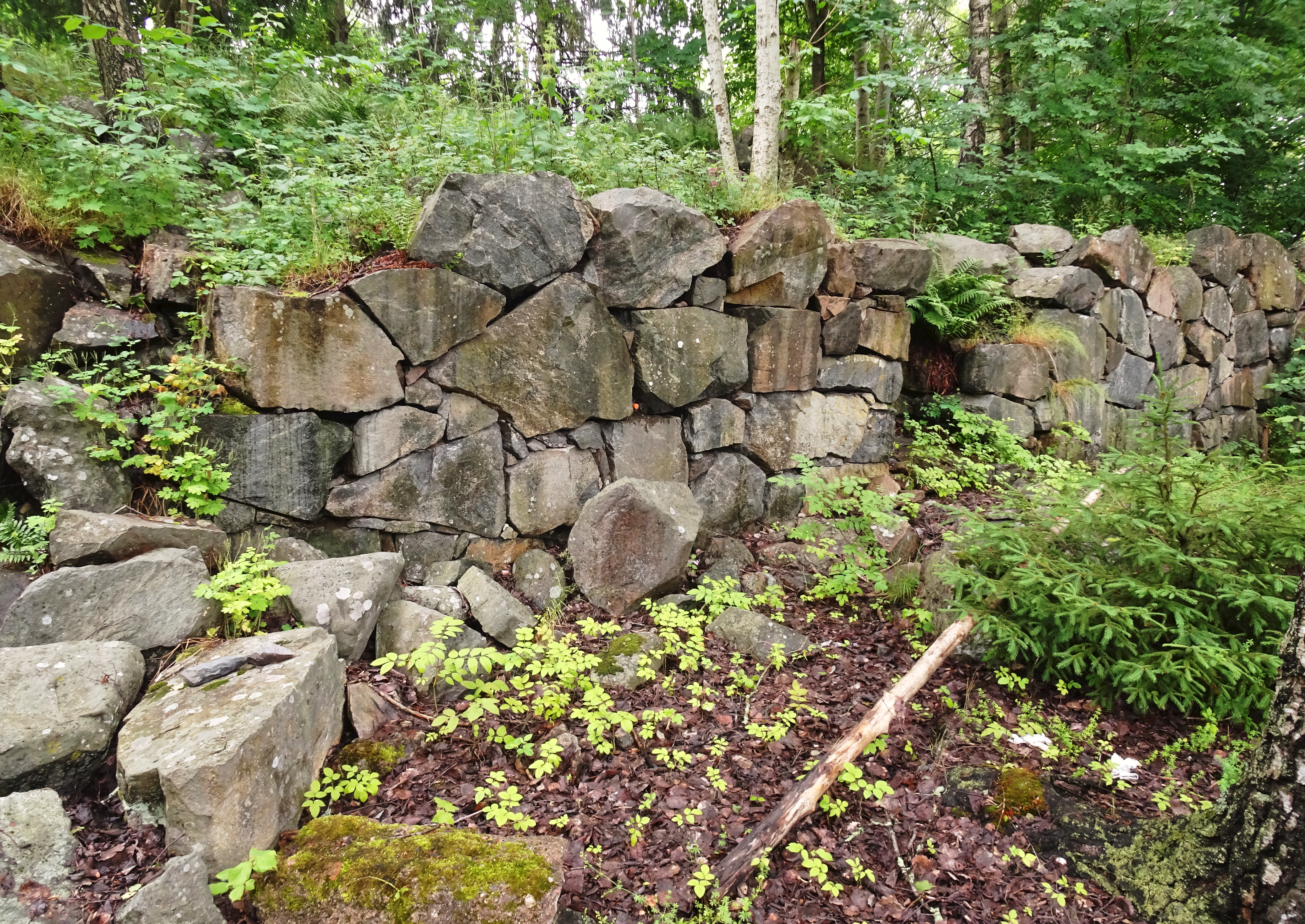 Grunden till Vistabergs ladugård, RAÄ-nummer Huddinge 169:1